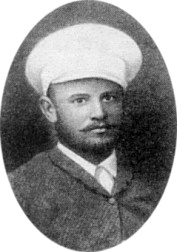 Евно Азеф